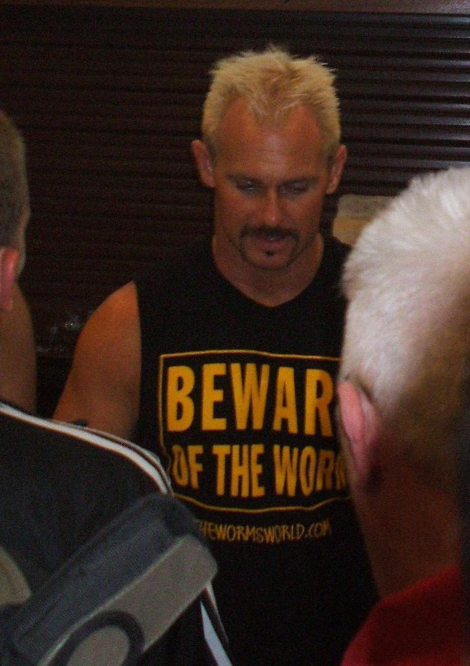 catcheur Scott Garland dit Scotty 2 Hotty